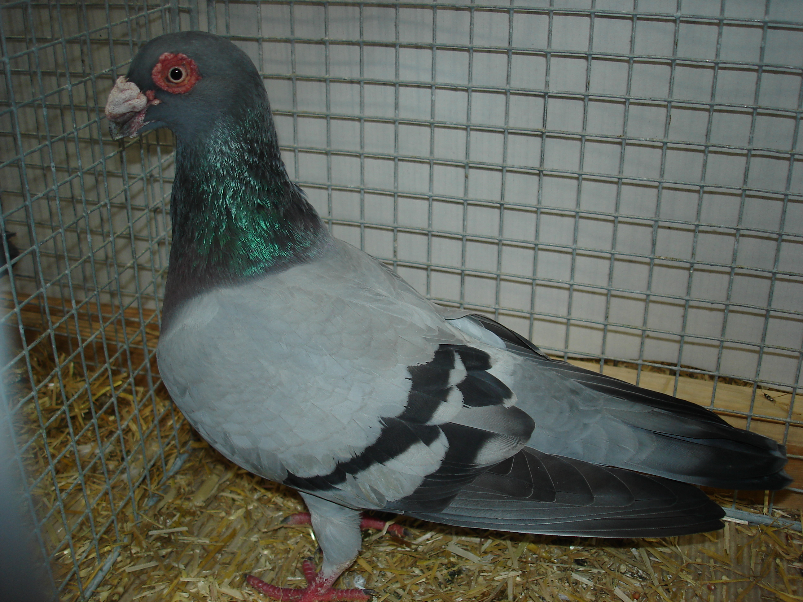 Zdjęcie gołębia rasy indian